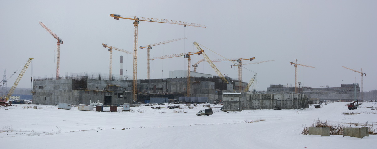 Строительная площадка энергоблока БН-800 Белоярской АЭС